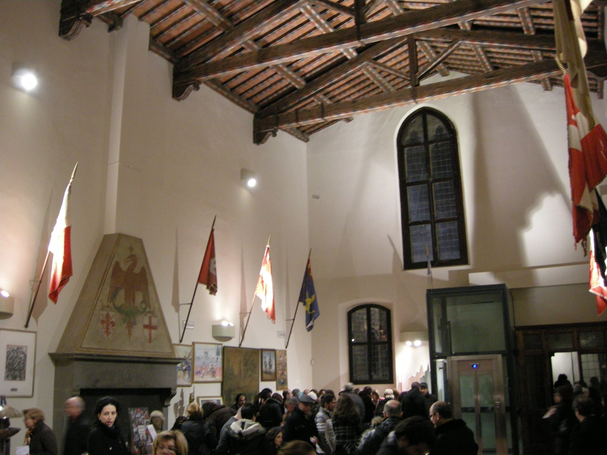 Palagio di parte guelfa, sala delle bandiere